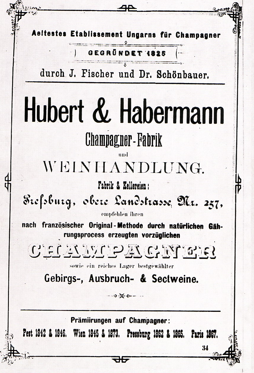 Hubert & Habermann in Preßburg